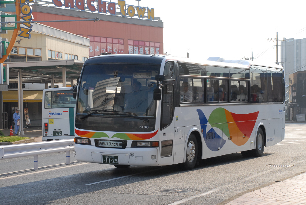 阪九フェリー送迎 2018-3-28砂津にて撮影